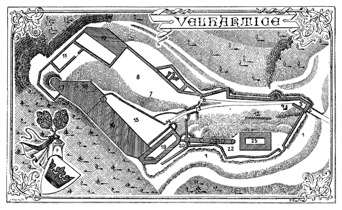 Velhartice – půdorys hradu od Vojtěcha Krále z Dobré Vody publikovaný roku 1897; Popis: 1 – příkop, 2 – most přes příkop, 3 – první brána, 4 – světnička vrátného, 5 – bašta, 6 – vchod do parkánu, 7 – velký parkán, 8 – stará kašna, 9 – vinopalna, 10 – pivovar a sýpky, 11 – hospodářské budovy, 12 – hradba, 13 – cesta do hradního jádra, 14 – brána do hradního jádra, 15 – nádvoří, 16 – Huertovo renesanční křídlo, 17 – kaple, 18 – novodobá část paláce, 19 – Rajský dům, 20 – padací most na kamenný most, 21 – kamenný most, 22 – horní dvorek, 23 – velká věž (Putna)